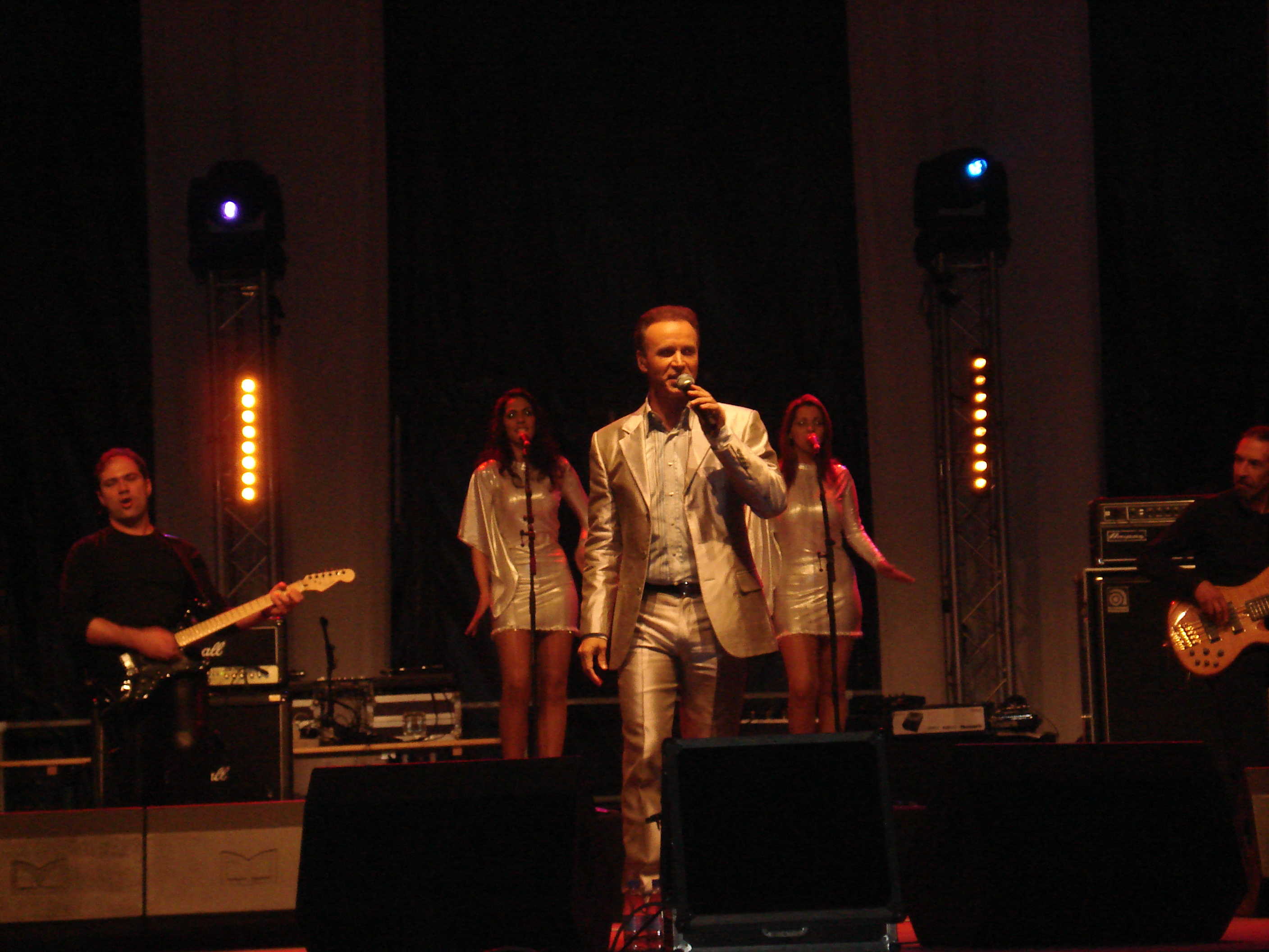 Emanuel chante à Pontault-Combault